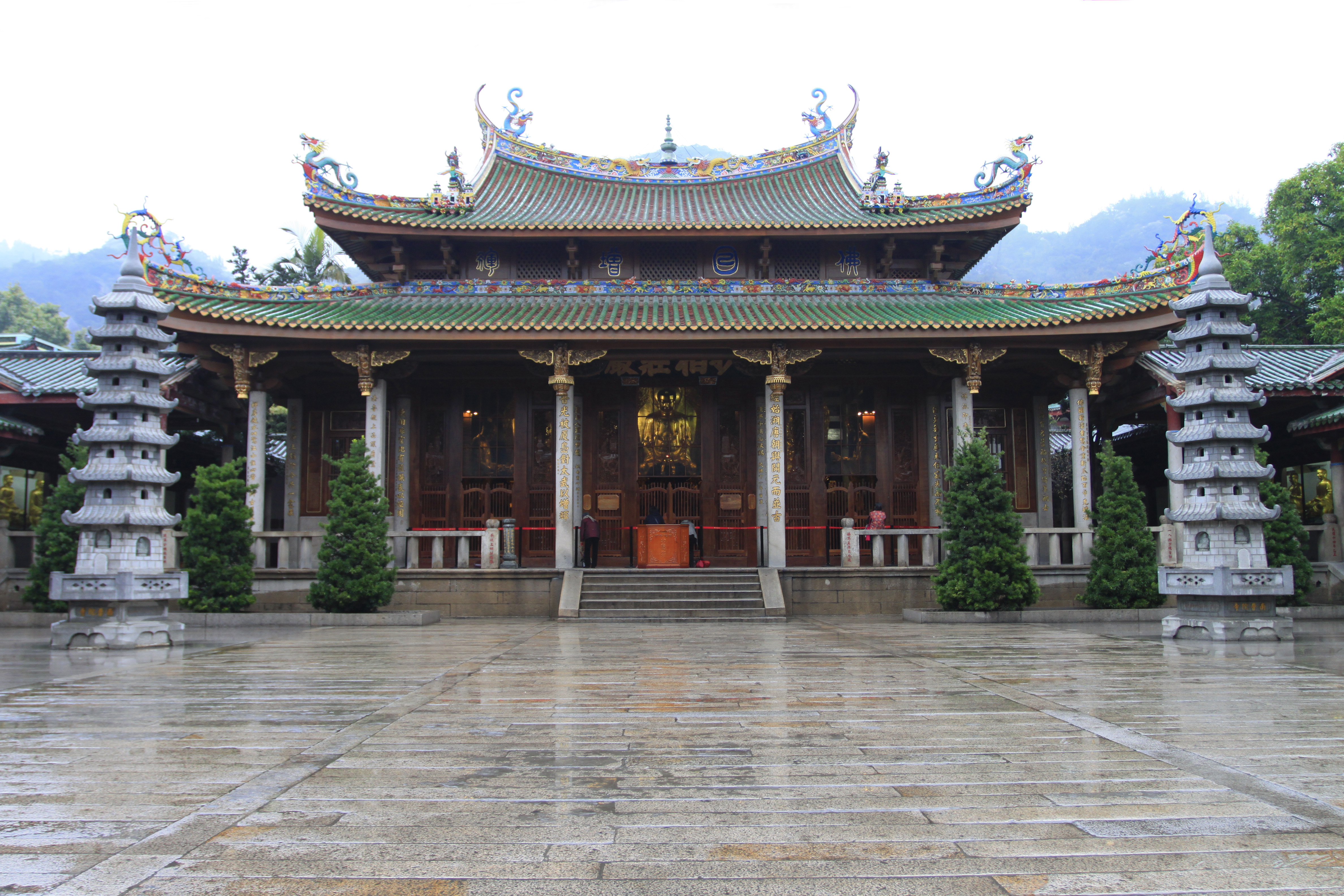 南普陀寺，位于中国福建省厦门市。